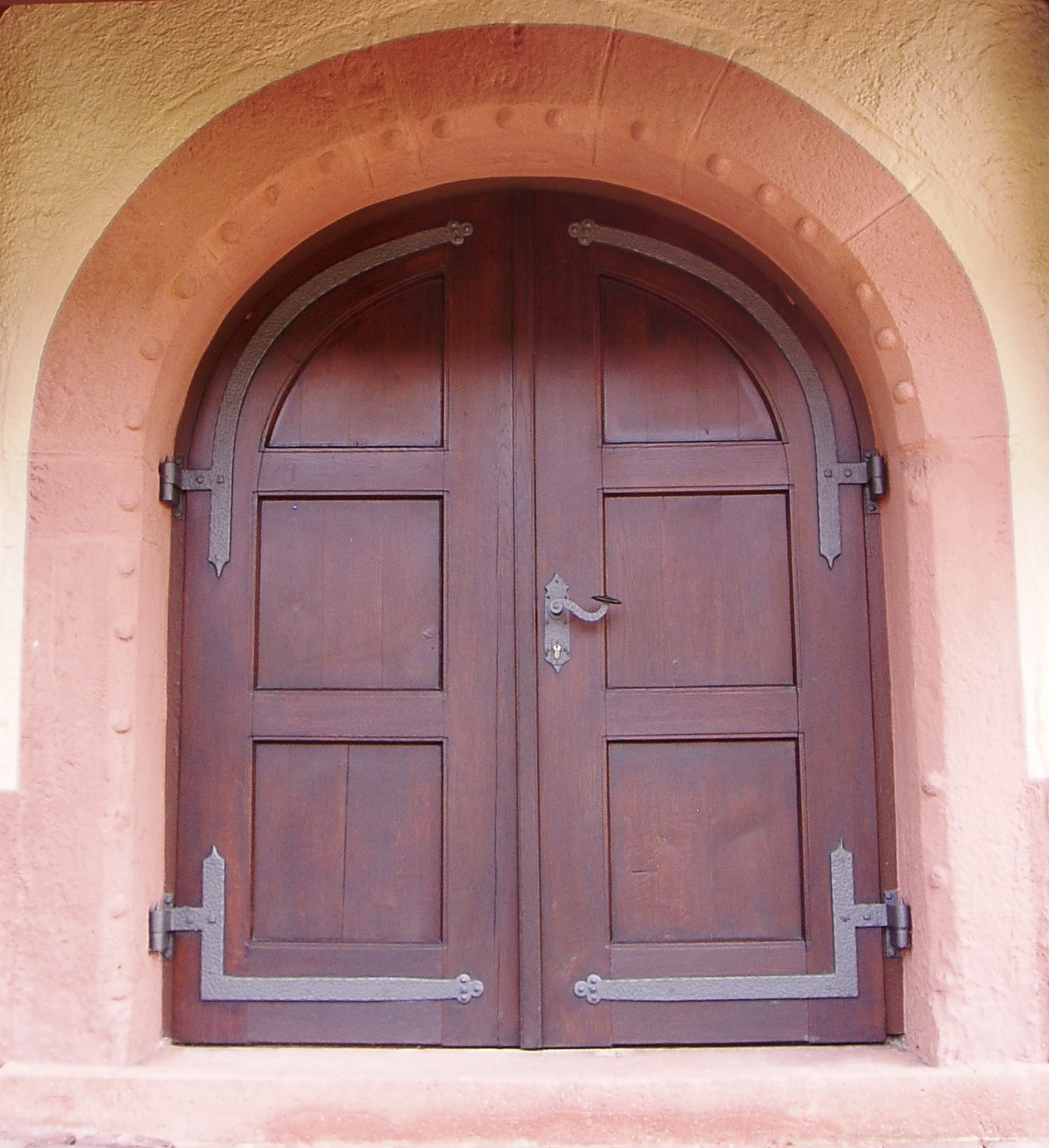 Westportal der Kirche von Wittelbach